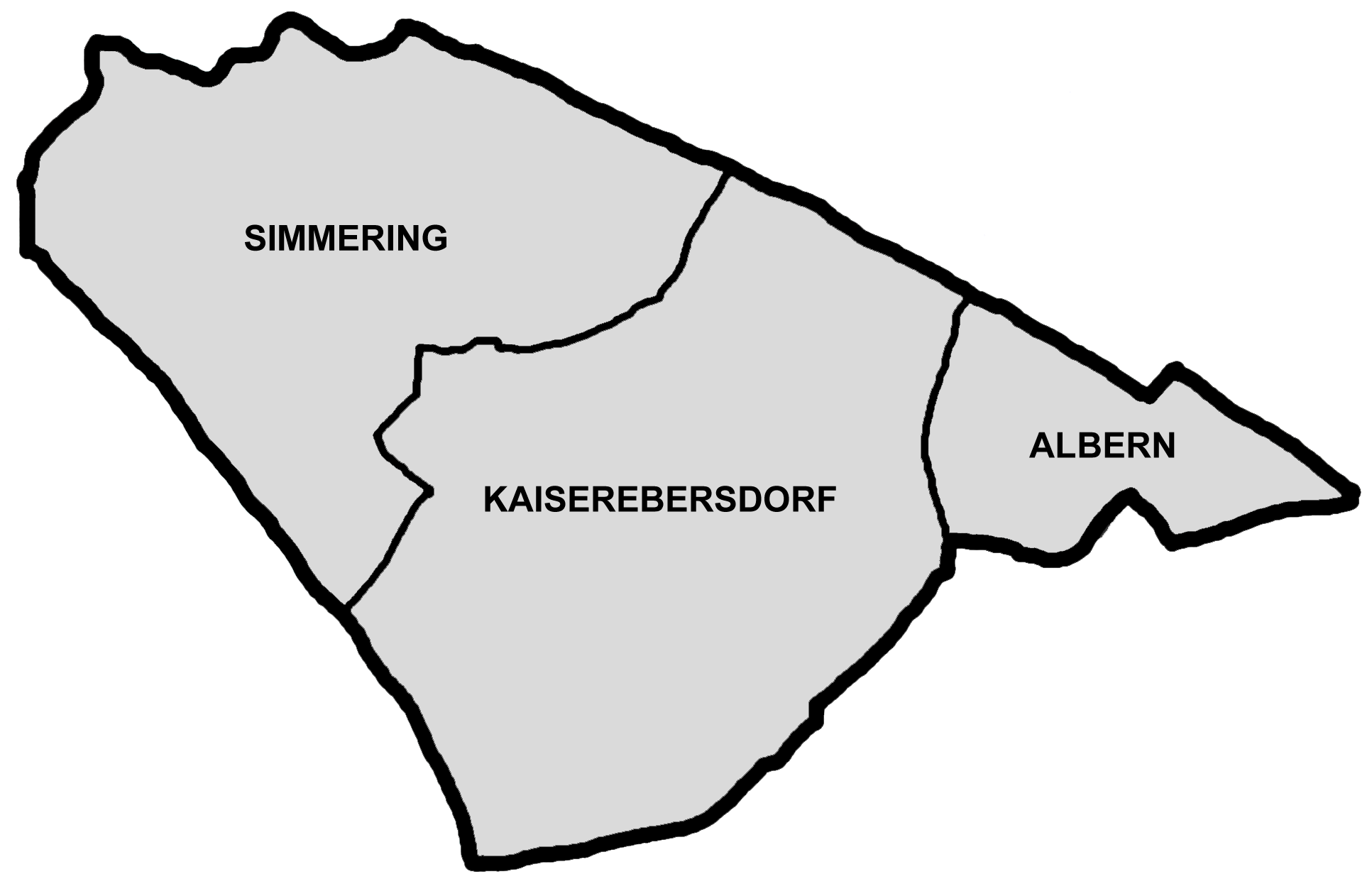 Karte der Bezirksteile von Simmering in Wien.